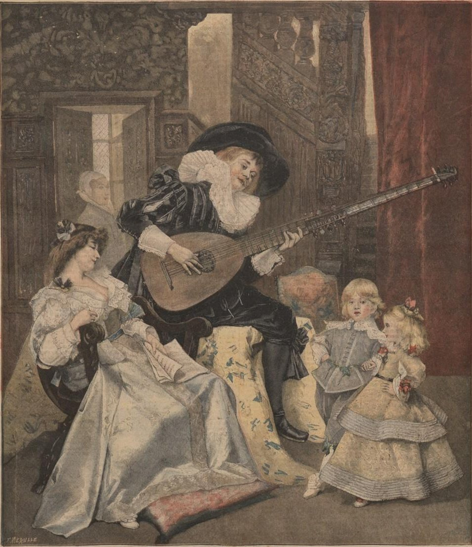 La Sarabande